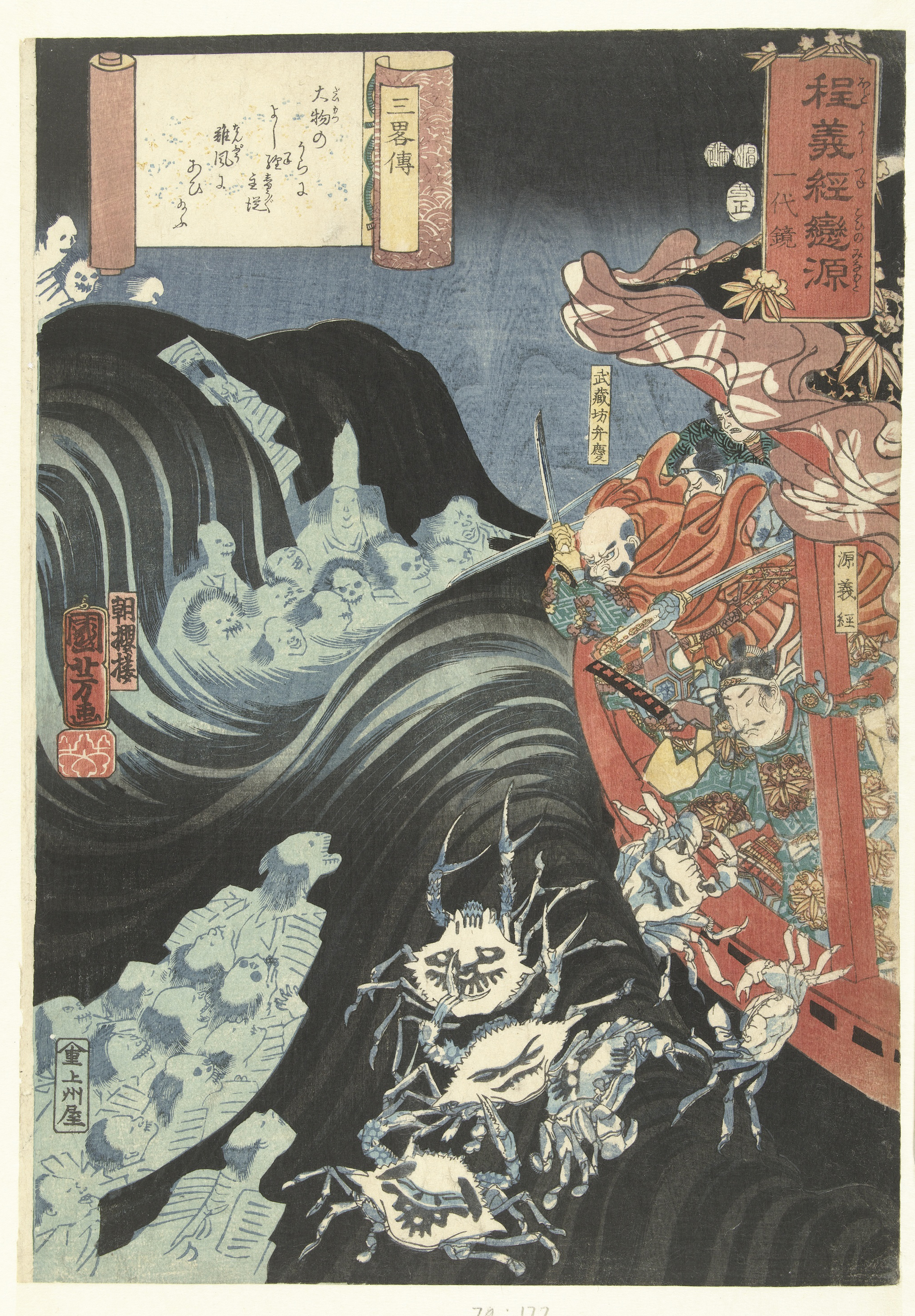 Yoshitsune en Benkei zich verdedigend in een boot, tijdens een storm veroorzaakt door de geesten van verslagen Taira krijgers zichtbaar in het water als aanvallende skeletten en krabben. Label Line: mentioned on object Utagawa Kuniyoshi (1798 - 1861), 1853, kleurenhoutsnede; lijnblok in zwart met kleurblokken Collection: prenten; Japan (collectie)